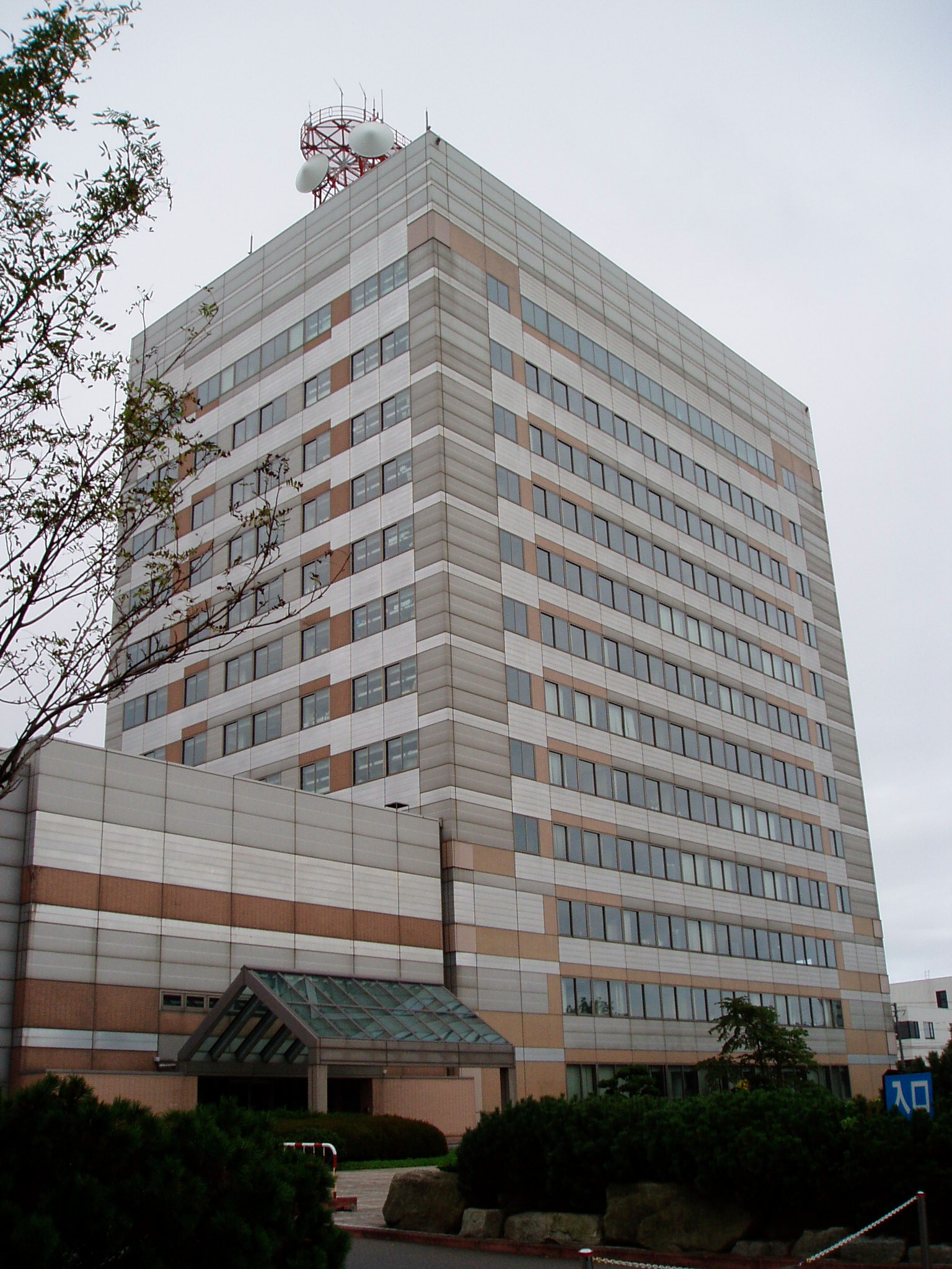 Tomakomai City Hall in Hokkaidō, Japan